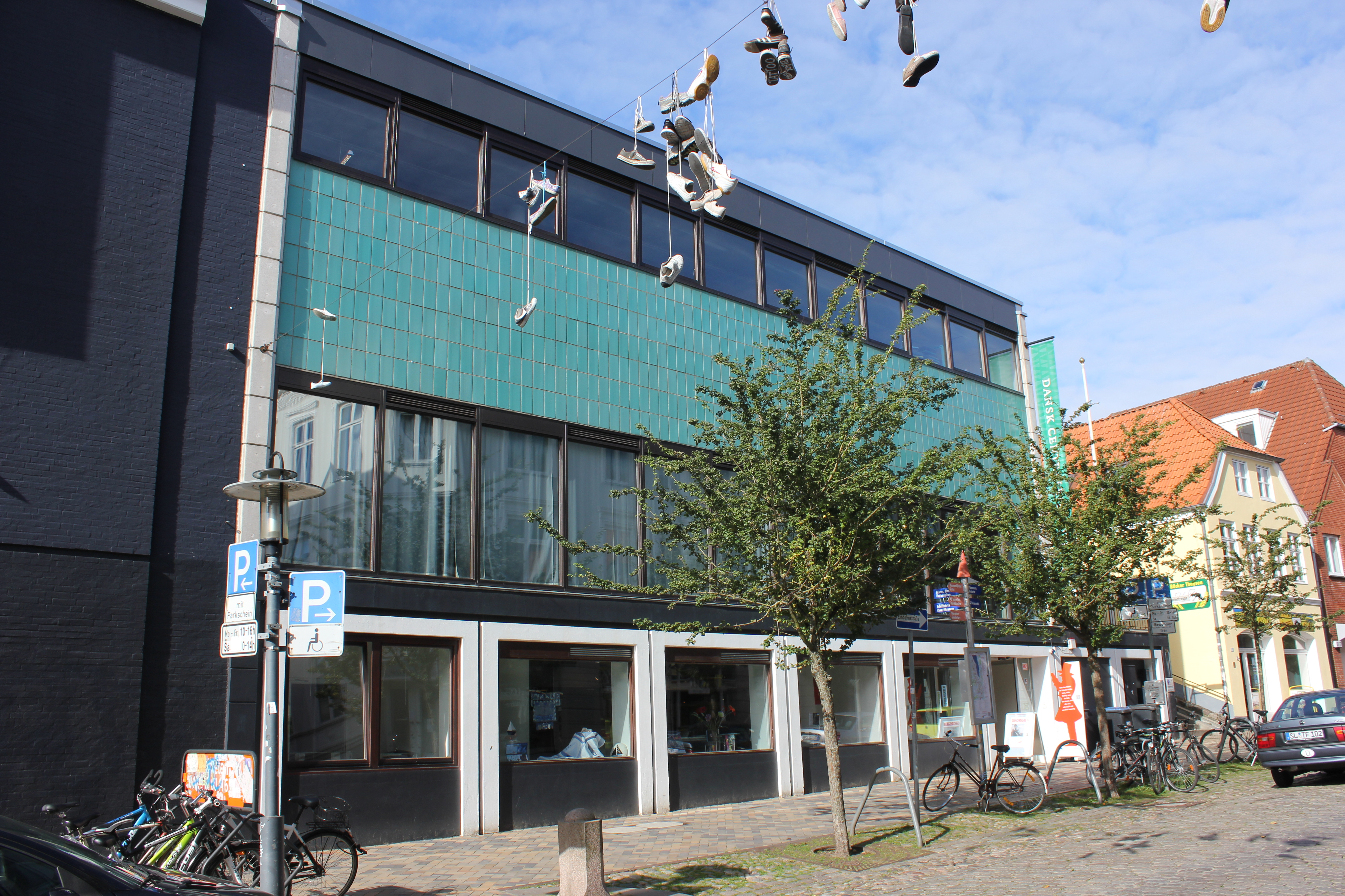 Hängende Schuhe in der Norderstraße bei der Dänischen Zentralbibliothek für Südschleswig, Bild 02